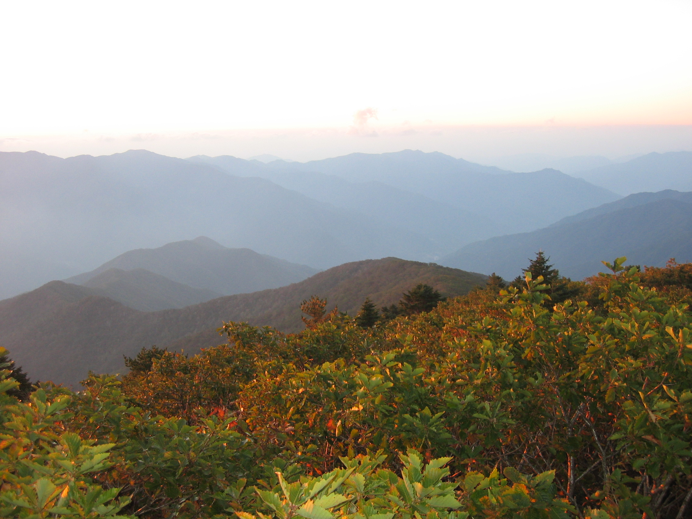 2006년 대한민국 지리산의 모습 The scenery of Jirisan, in South Korea, 2006